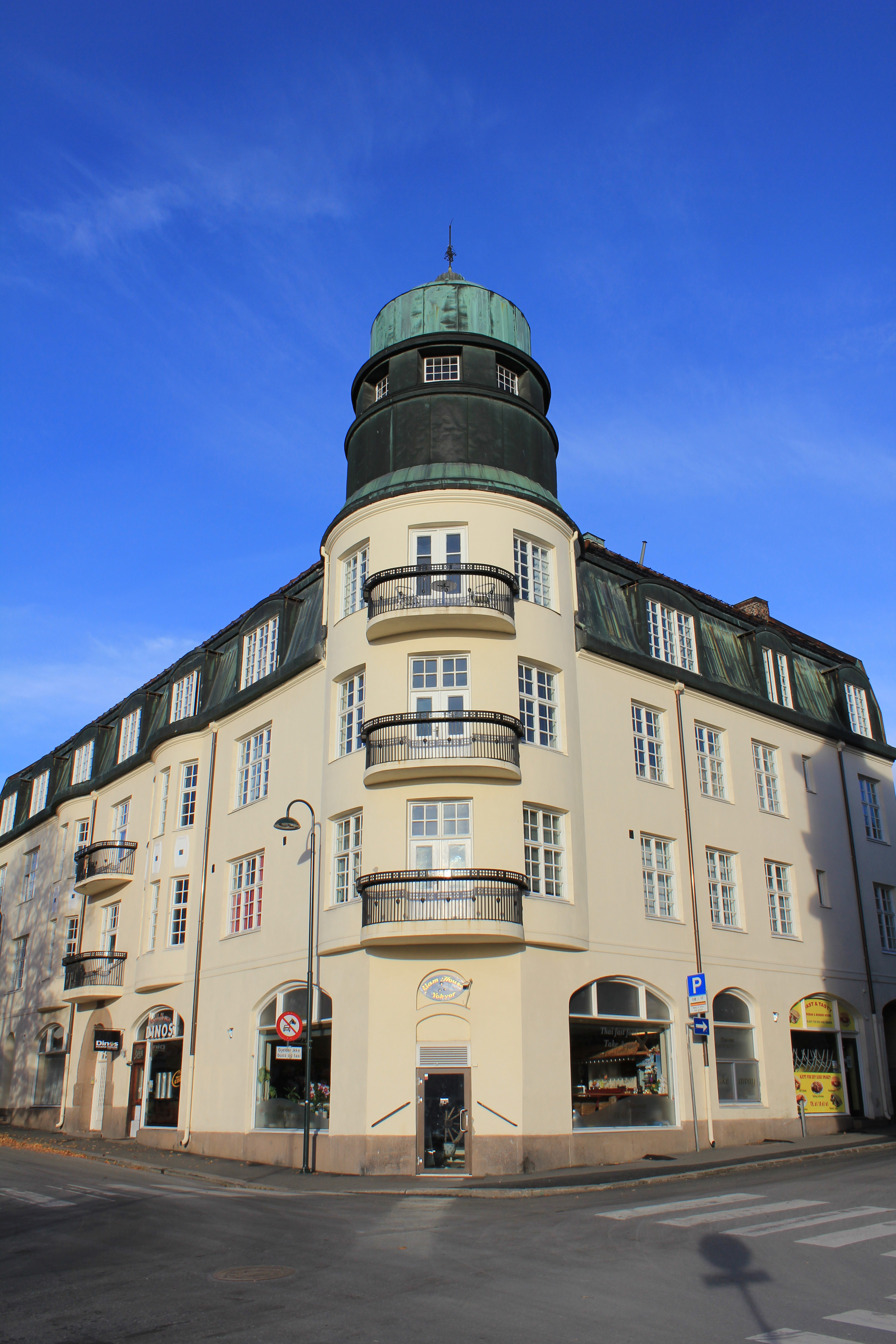 Vingården i Trondhjemsvegen 2 på Gjøvik. Nb! Merk at jeg feilaktig har skrevet Jernbanegata i billedtittelen. Vingården er bygget i jugendstil og står som en verdig representant for den tårnarkitekturen som tidligere karakteriserte byen, som en refleks av de tre markante bytoppene Hovde- Tranberg- og Bergstoppen. I dag er tårnarkitekturen oppgitt som et kjennemerke for byen, og man har gått over til en stedløs internasjonal stil.